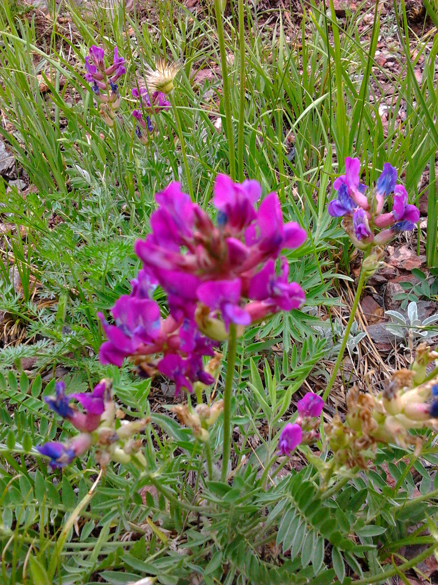 Общий вид цветка остролодочника